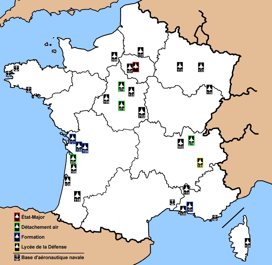 Carte des bases aériennes situées en France métropolitaine en 2018